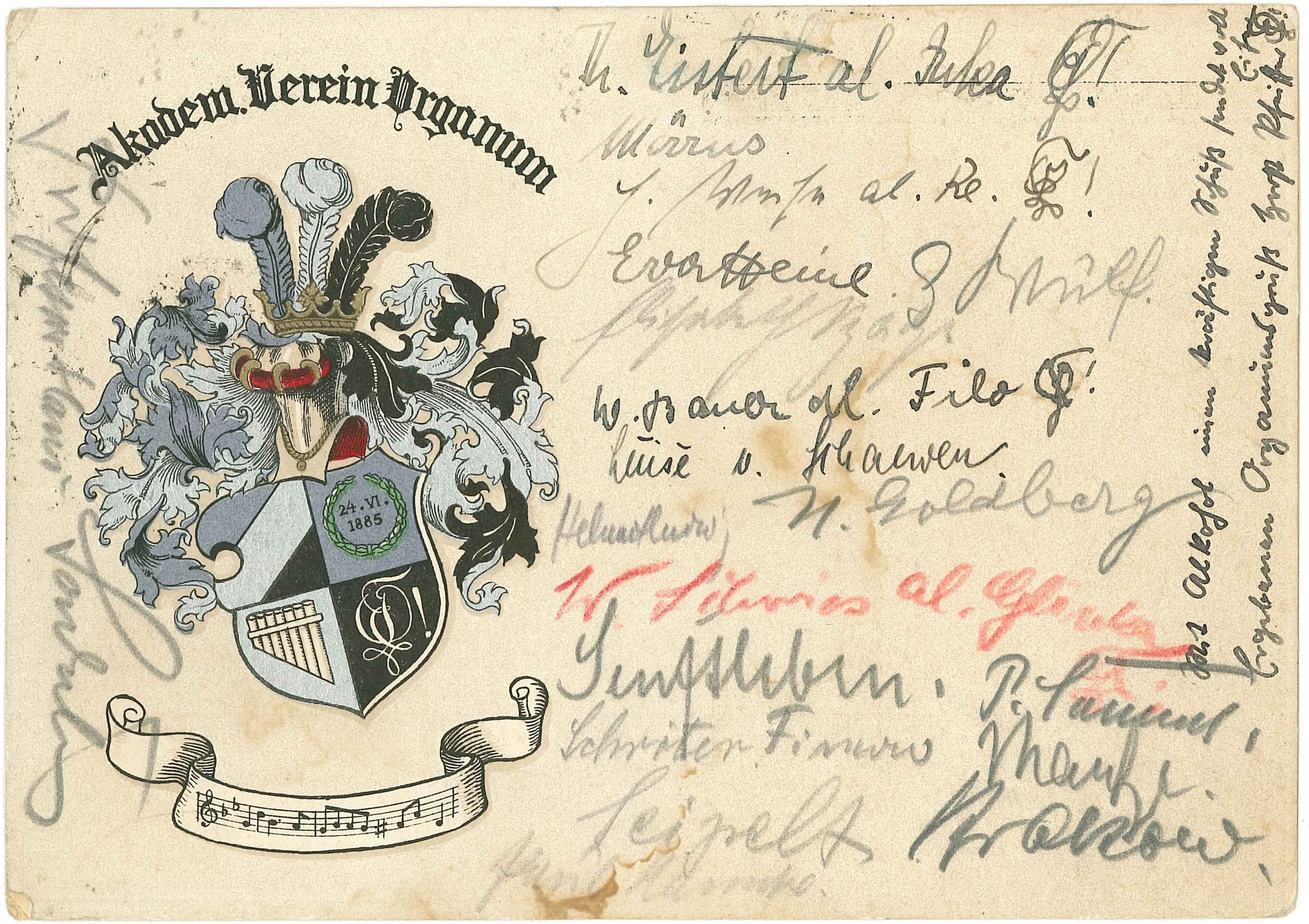 Couleurkarte des Akademischen Vereins Organum